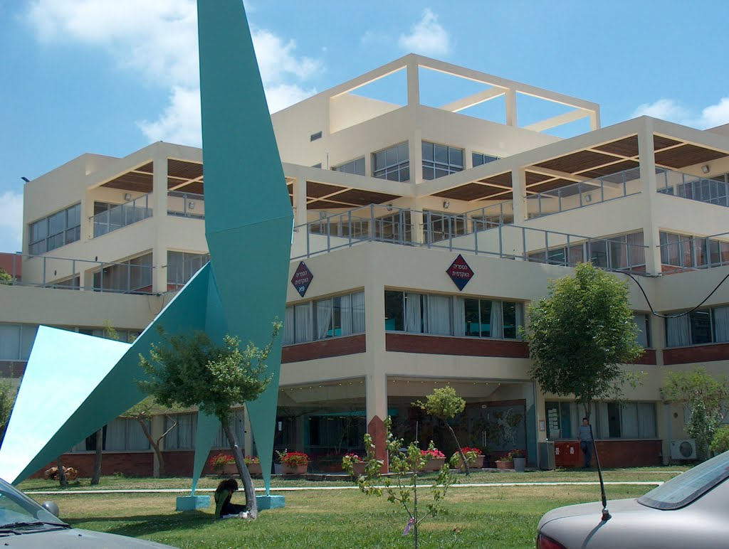 הספריה האקדמית באוניברסיטה